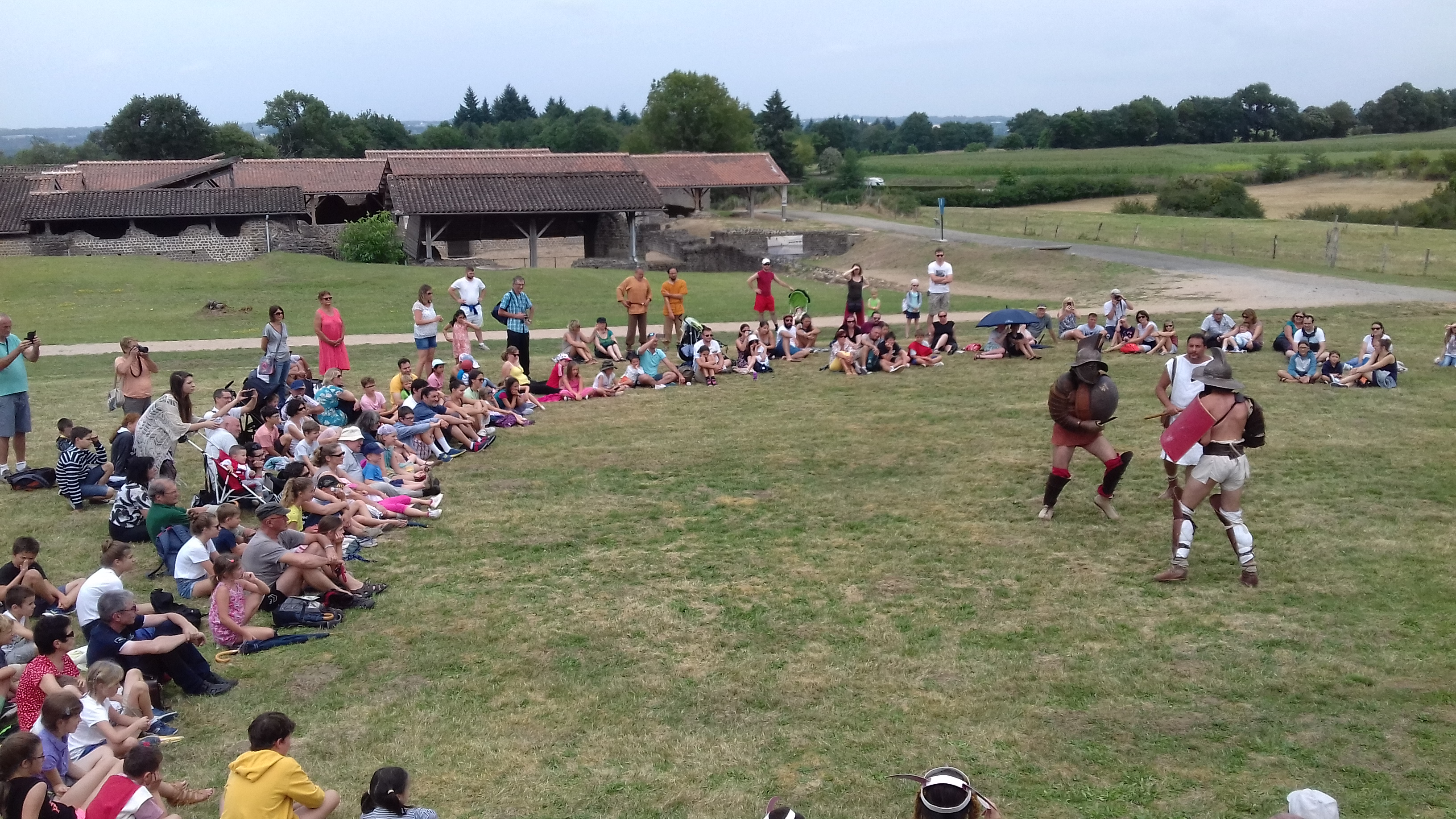 Journée thermes Cassinomagus